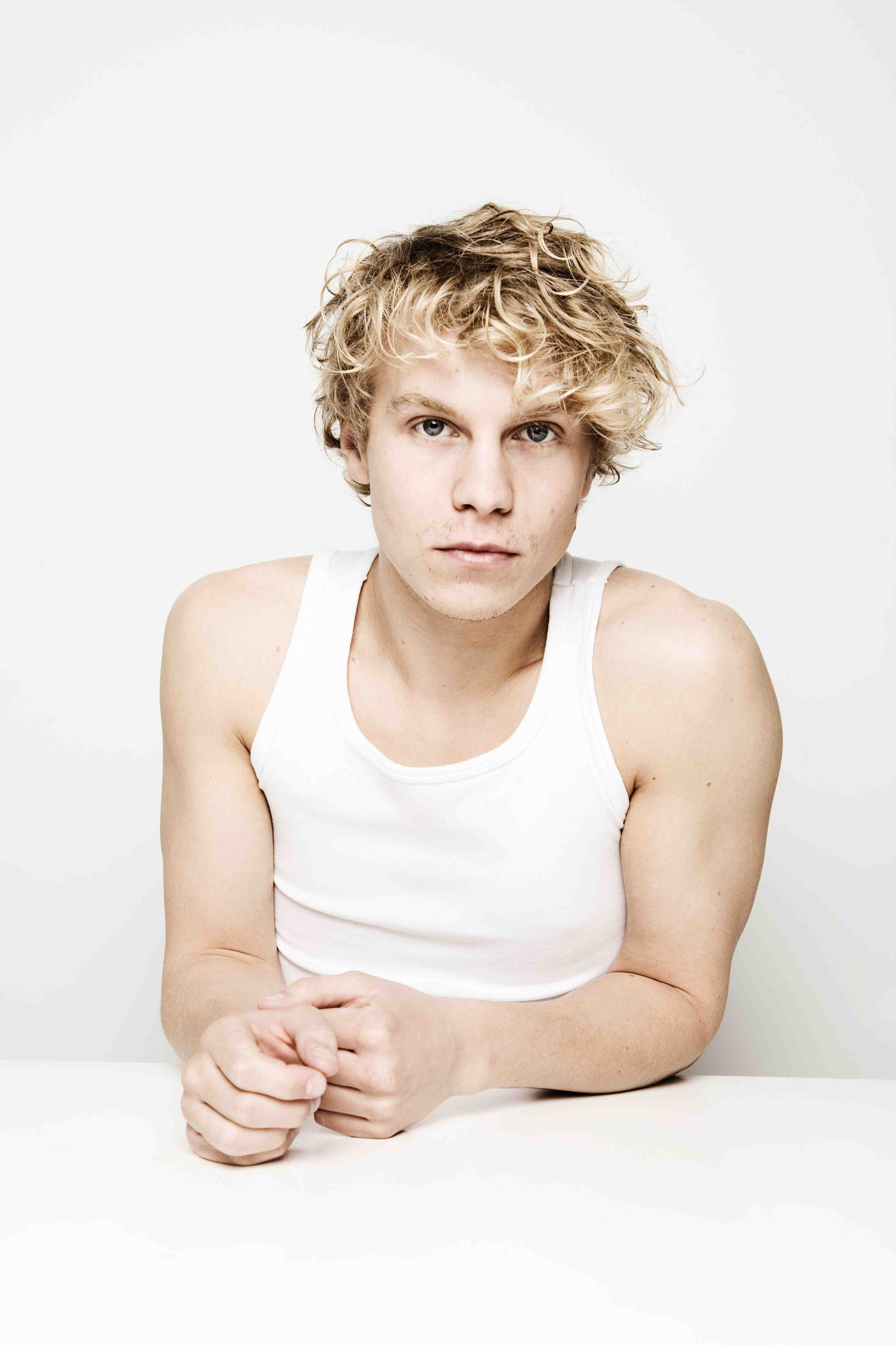 Portretfoto gemaakt door Guy Kokken.